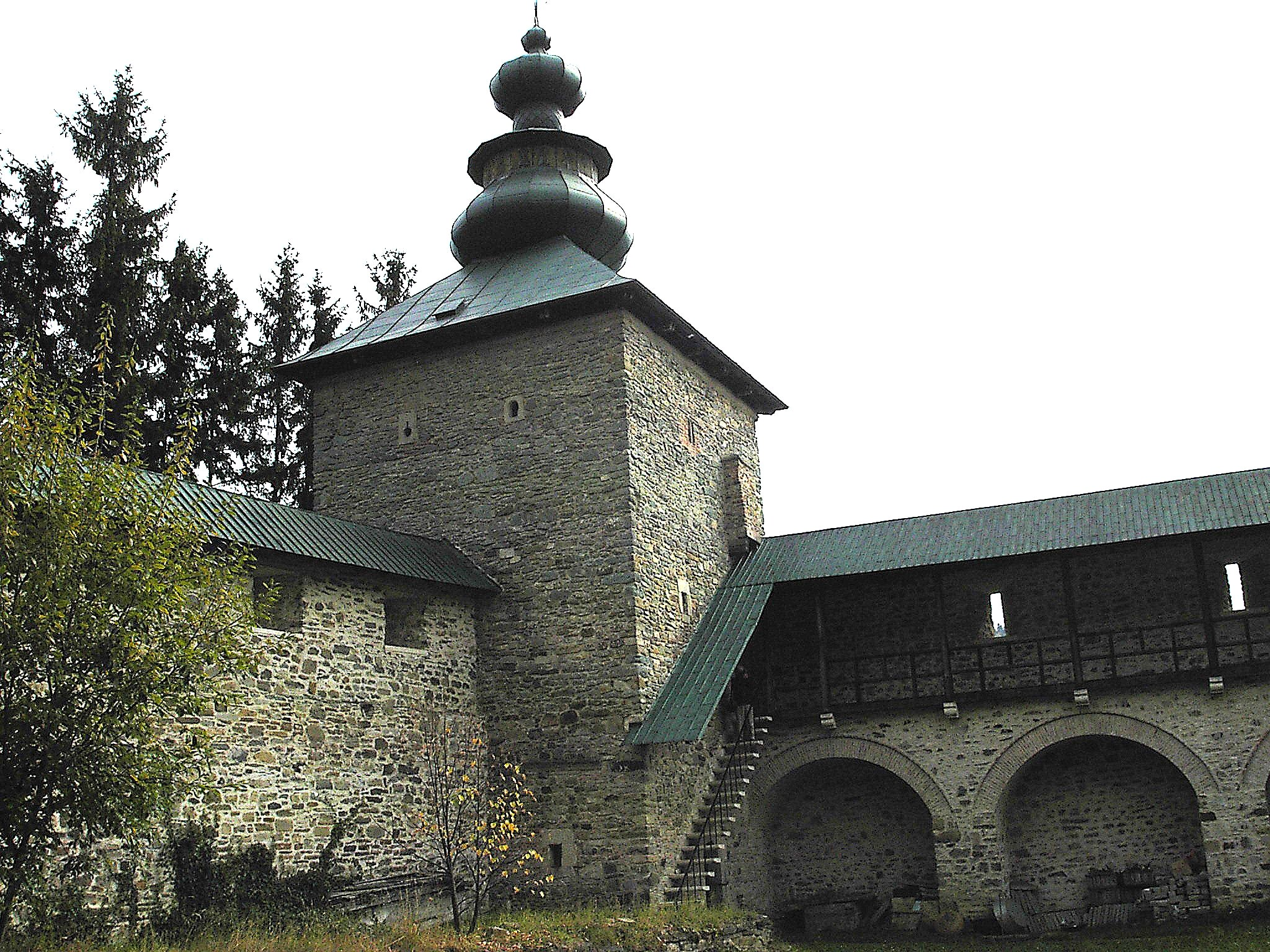 Slatinai kolostor, Románia